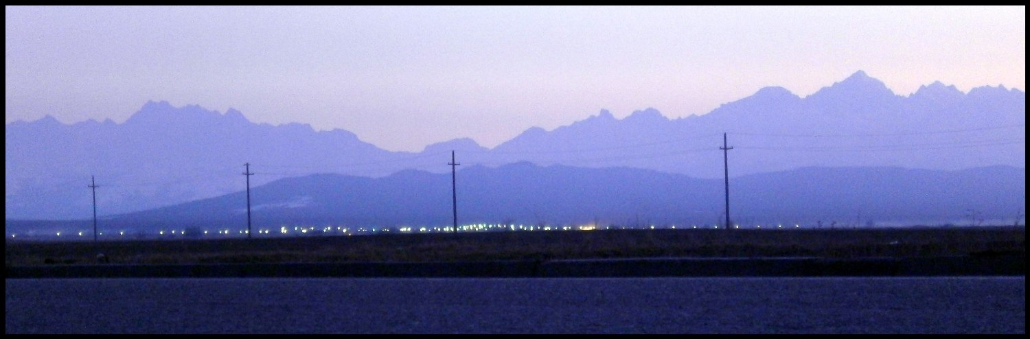 Вид на горы из Нарткалы